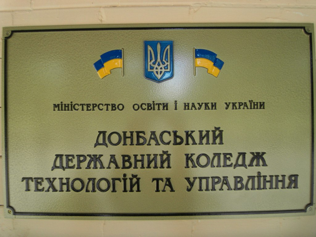 Фото табличкі з назвою учбового закладу "Донбаський державний коледж технологій та управління" на стені будівлі коледжу біля входу в учбовий корпус